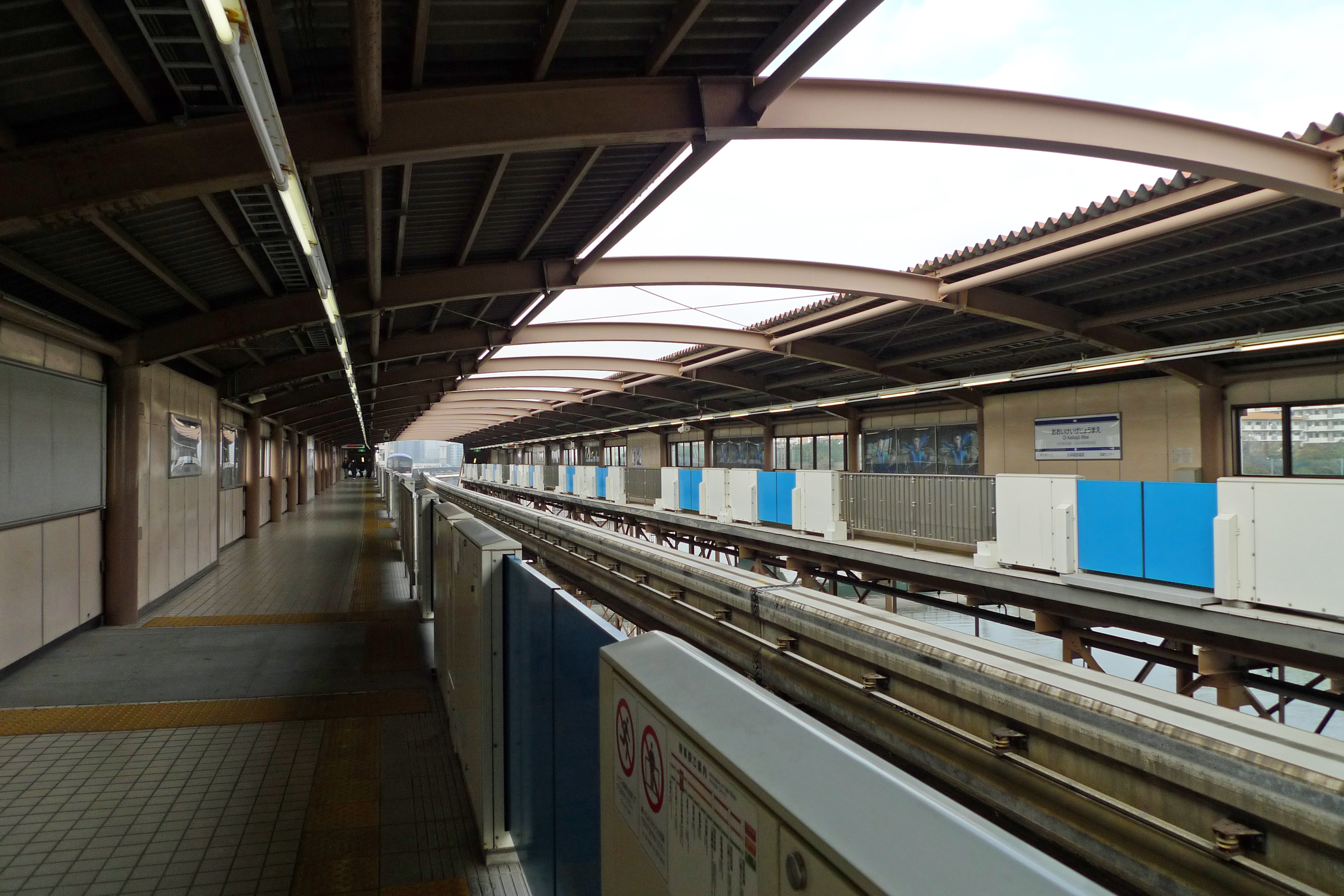 東京モノレール大井競馬場前駅ホーム